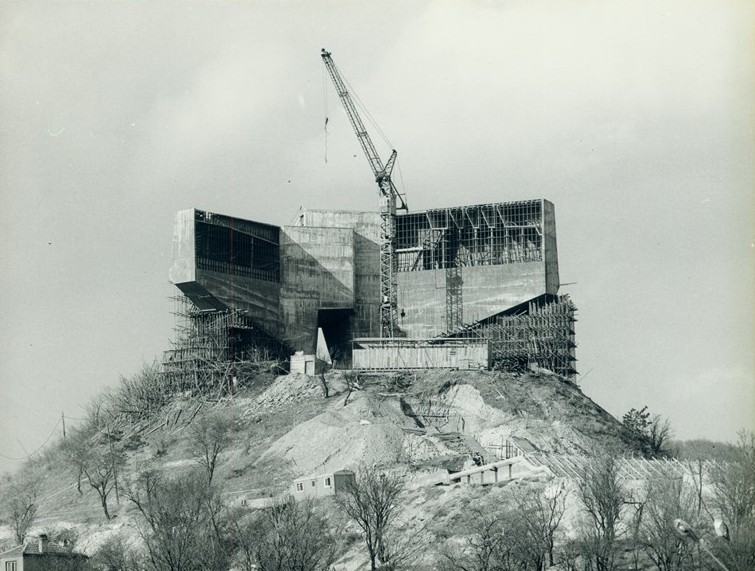 Строежът на парк-паметника на българо-съветската дружба.